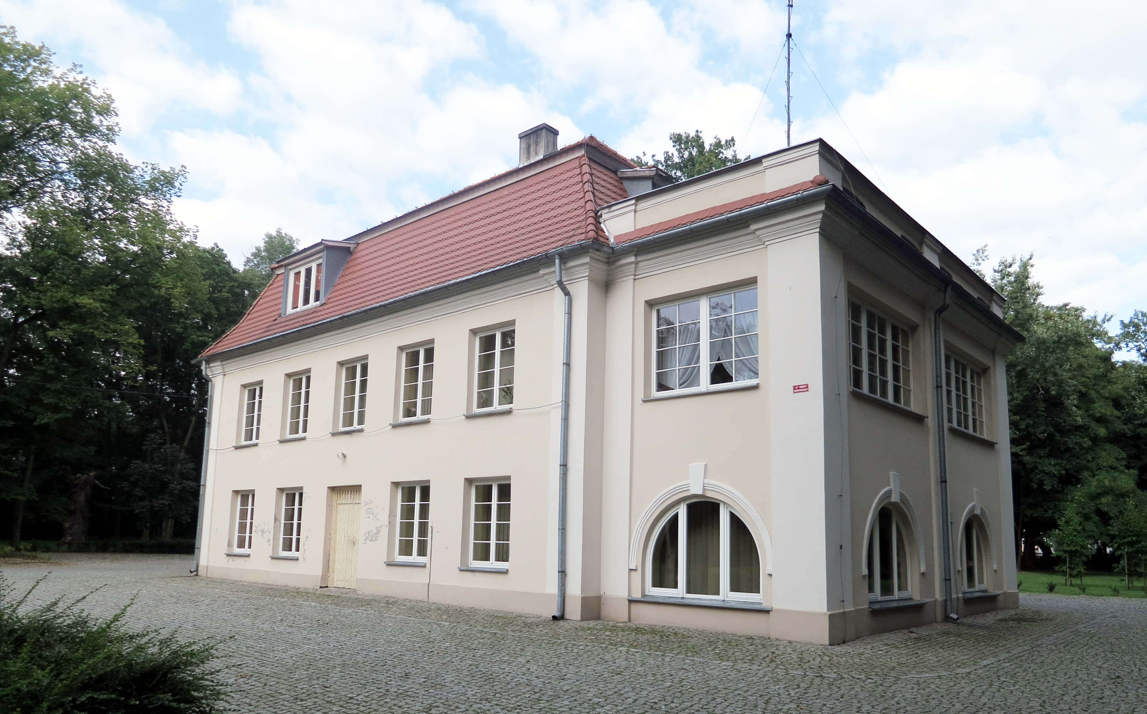 Szczytniki, dwór, 2 poł. XVIII, 1910